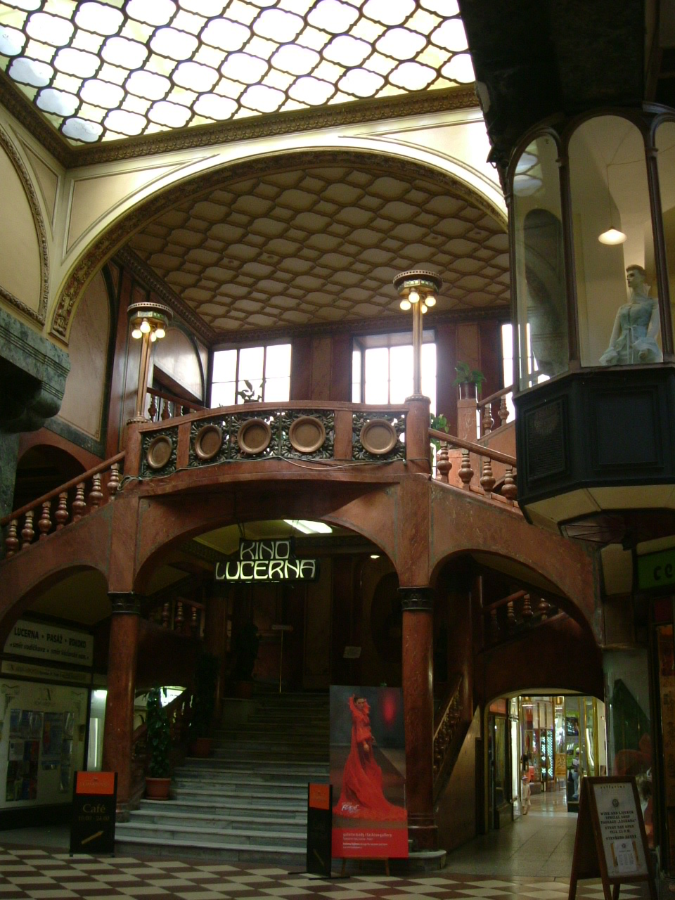 Die Lucerna-Passage mit dem Kino Lucerna unweit des Wenzelsplatzes